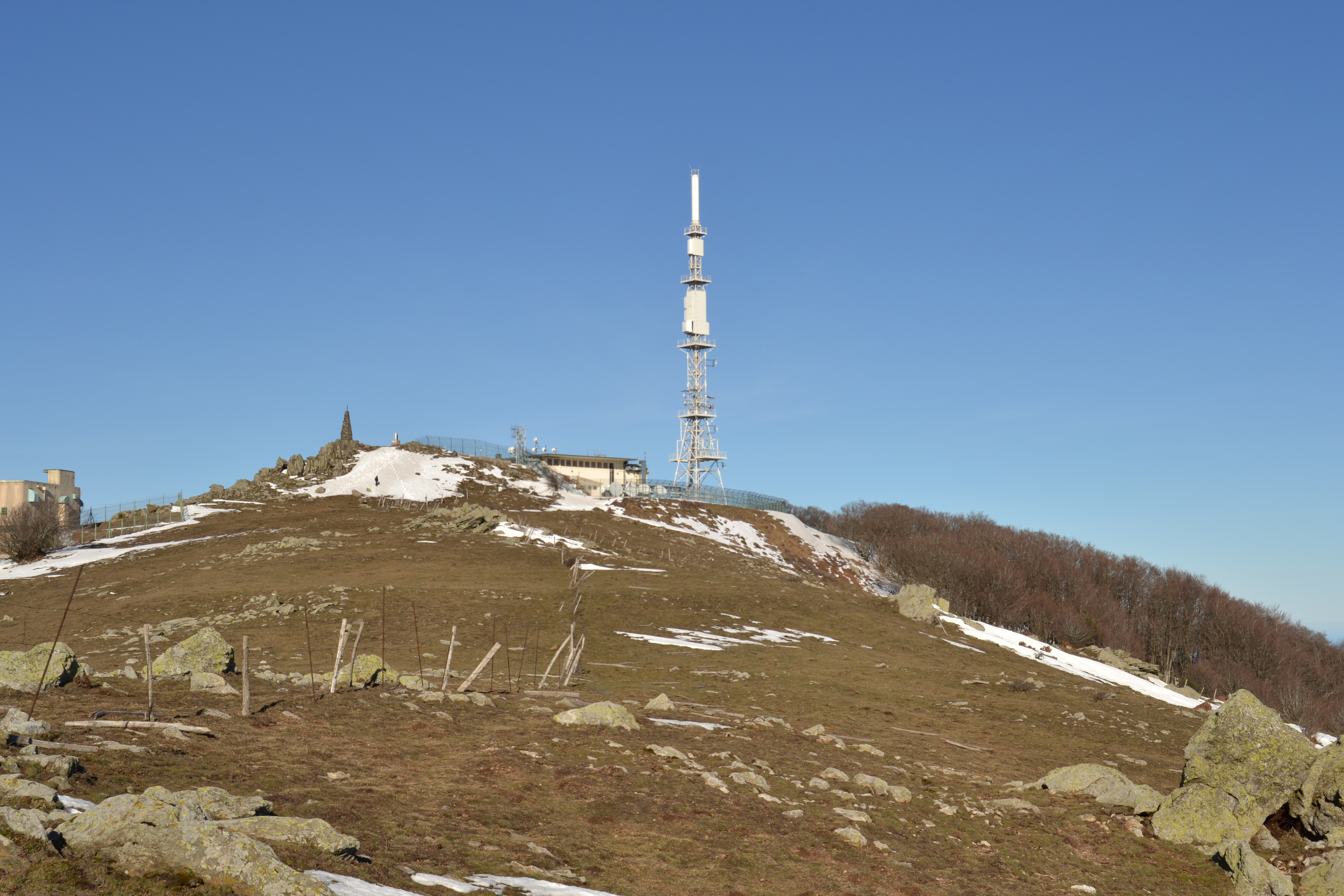 Puig Neulòs, a Catalunya, entre Espanya i França